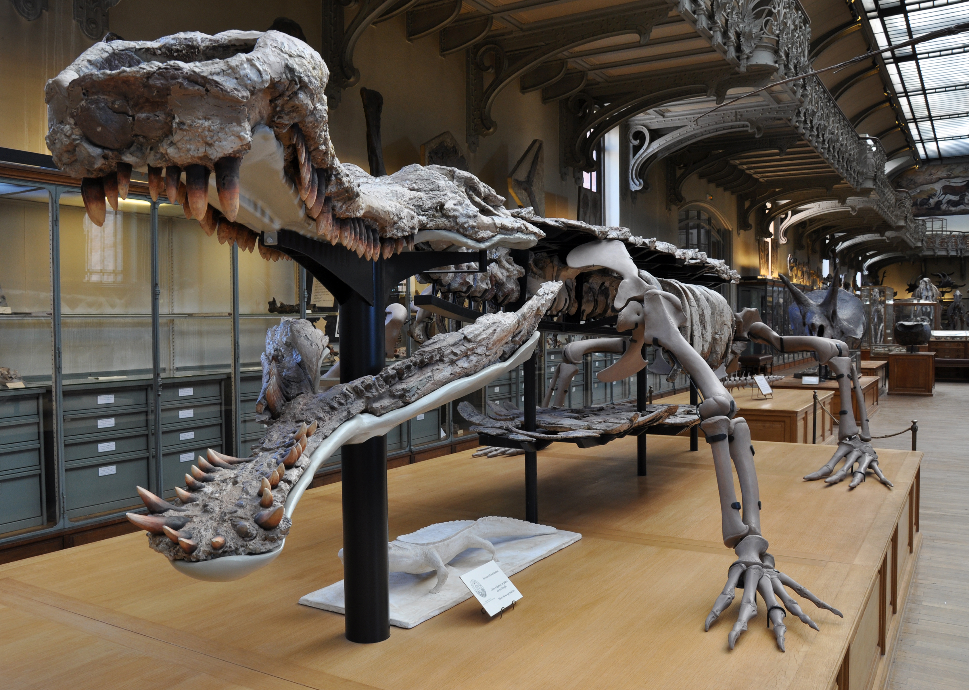 Museum National d'Histoire Naturelle à Paris, vue de la Galerie de Paléontologie et d'Anatomie Comparée, premier étage.